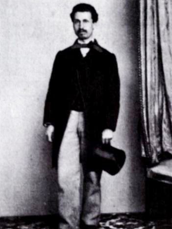 Francesco Corazzini, filologo e storico italiano.